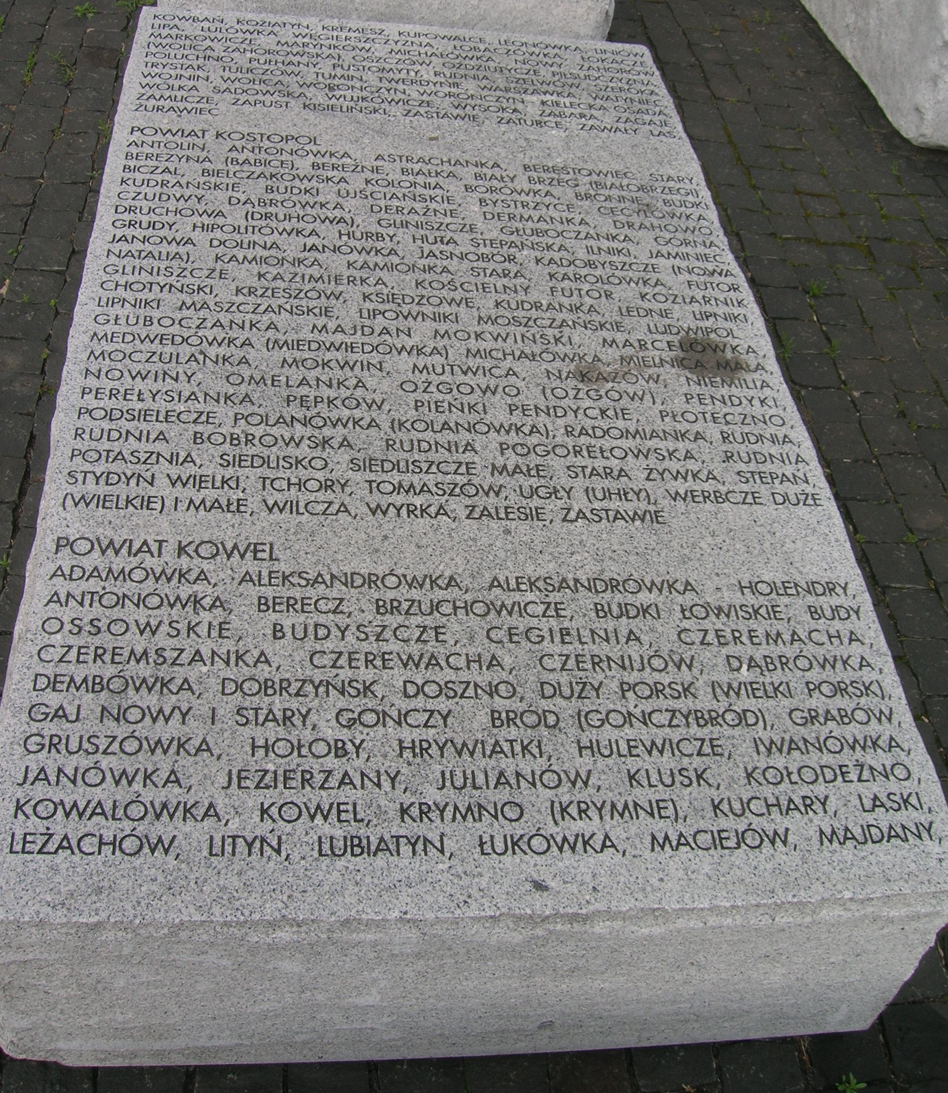 tablica II woj. wołyńskie